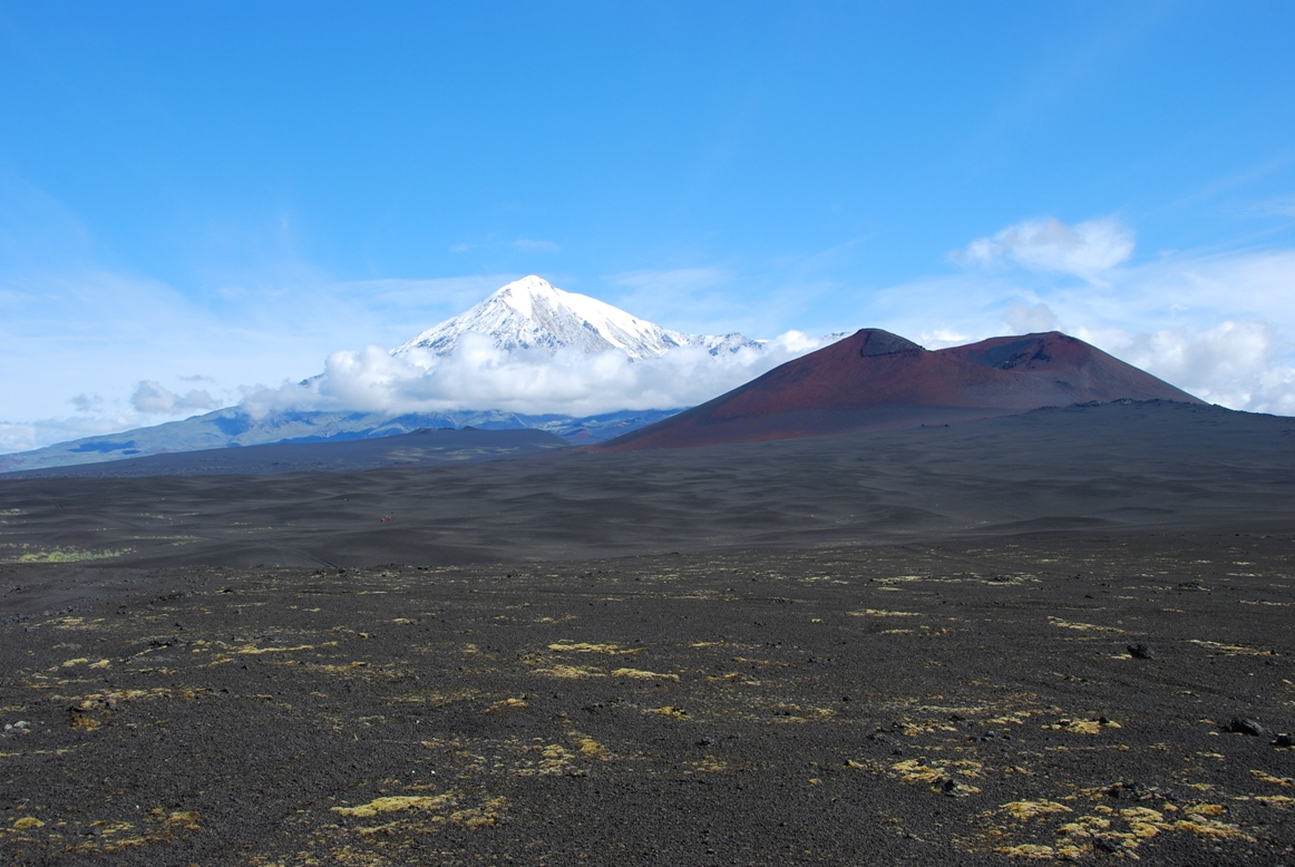 Северный и южный прорывы БТТИ 75-76 гг., Усть-Камчатский район This image is related to the protected area of Russia number 4110212